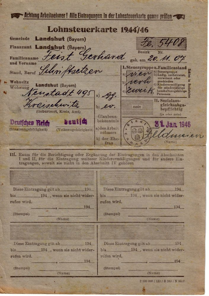 Vorderseite einer Lohnsteuerkarte aus dem Jahre 1946